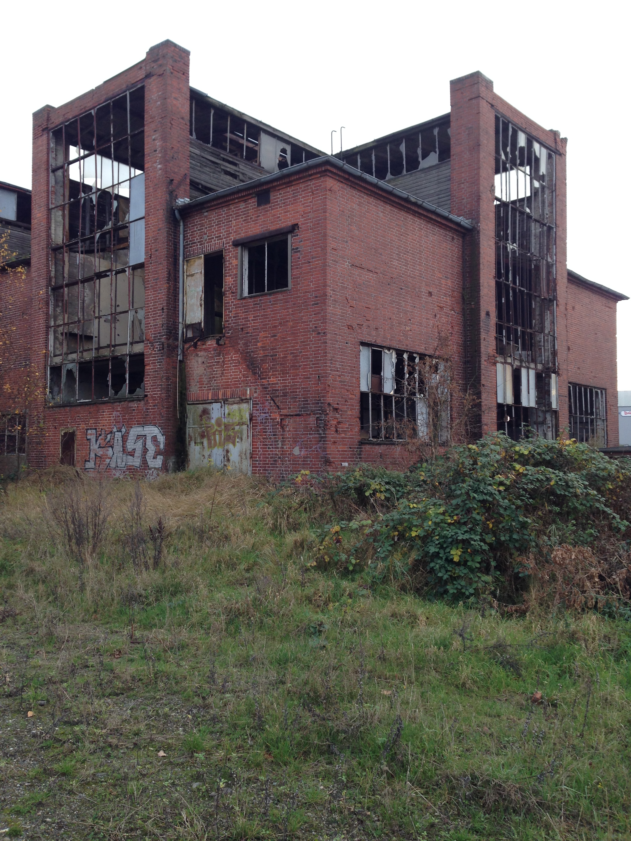 Industrieanlagen in Lübeck, Glashüttenweg 19-29, vormals Berlin-Lübecker Maschinenfabrik.